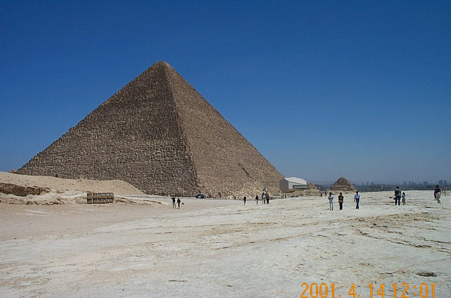 Hufu (Kheopsz) piramisa Gízában (Egyiptom)